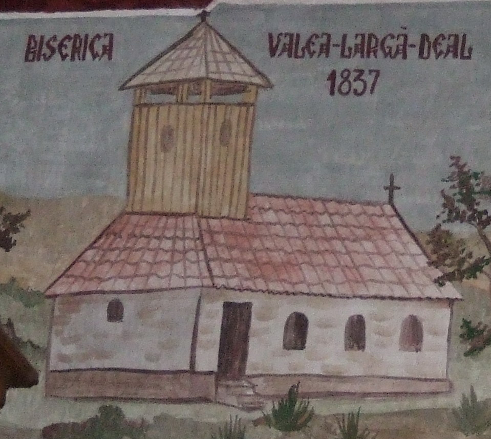 Reprezentare a bisericii de lemn din Boju/Valea Largă în noua biserică de zid din Valea Largă.